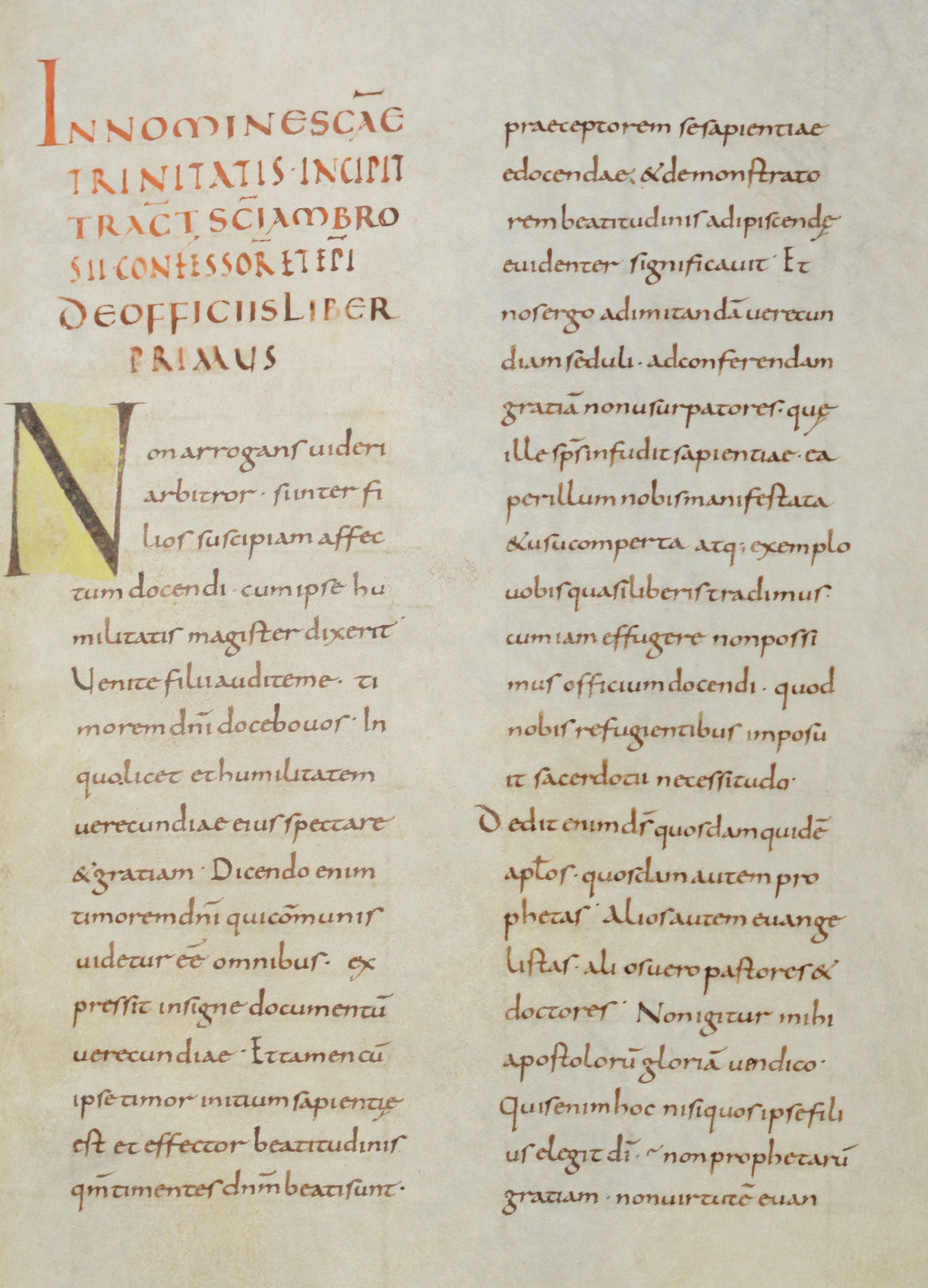 De officiis ministrorum. Rękopis spisany około roku 900 w opactwie Sankt Gallen. St. Gallen Stiftsbibliothek, Cod. Sang. 97, p. 51.